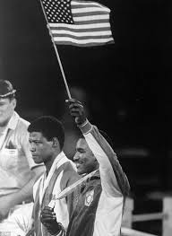 Moussa Mustapha au milieu de la photo, médaille de bronze aux jeux olympiques de Los Angeles 1984